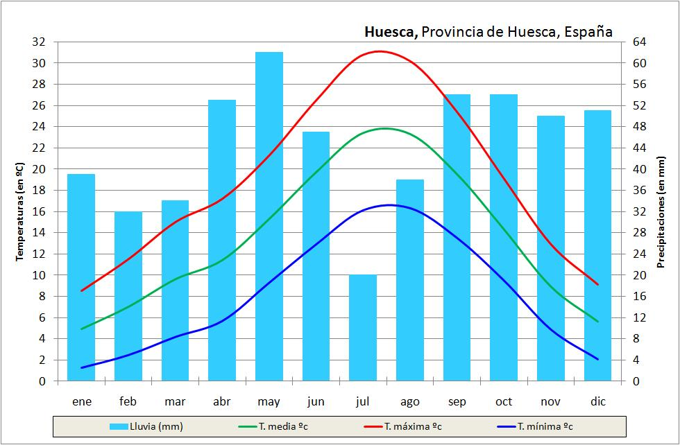 Climograma de Huesca (España)